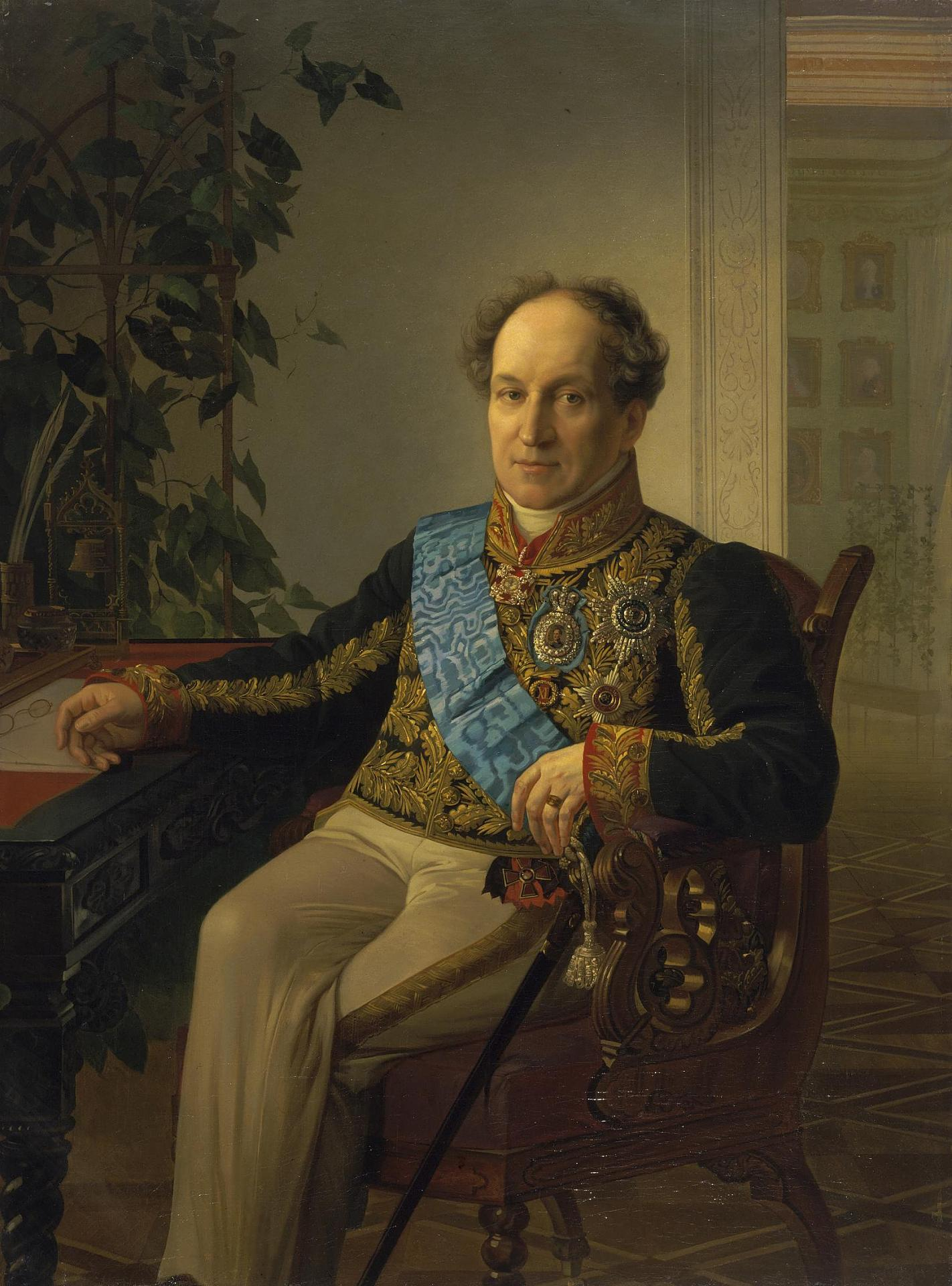 Портрет князя Александра Николаевича Голицына